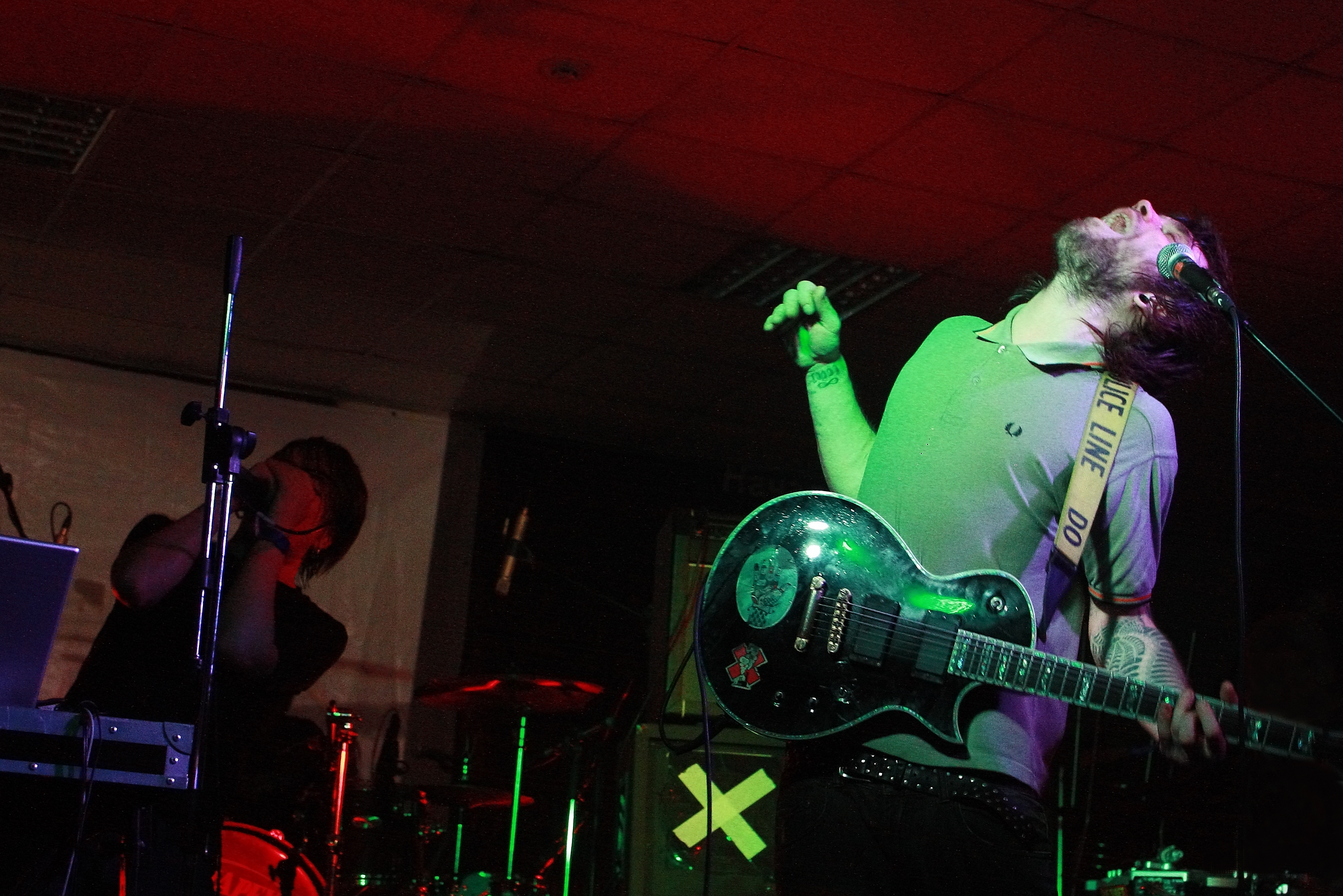 Дмитрий «Фео» Порубов (справа) и Андрей «Az» Зырянов (слева)